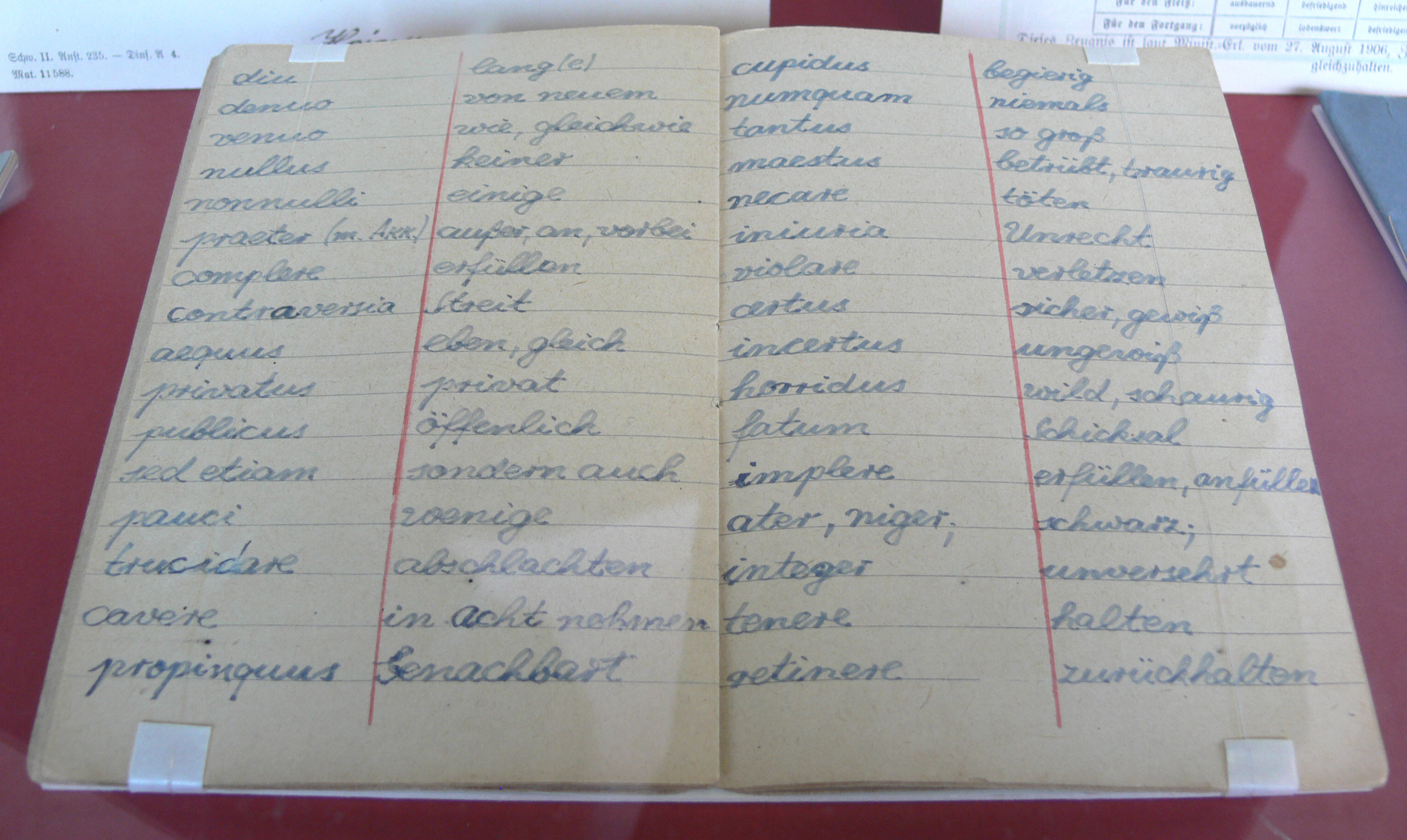 Sammlung Kindheit und Jugend (Stiftung Stadtmuseum Berlin) Latein-Vokabelheft